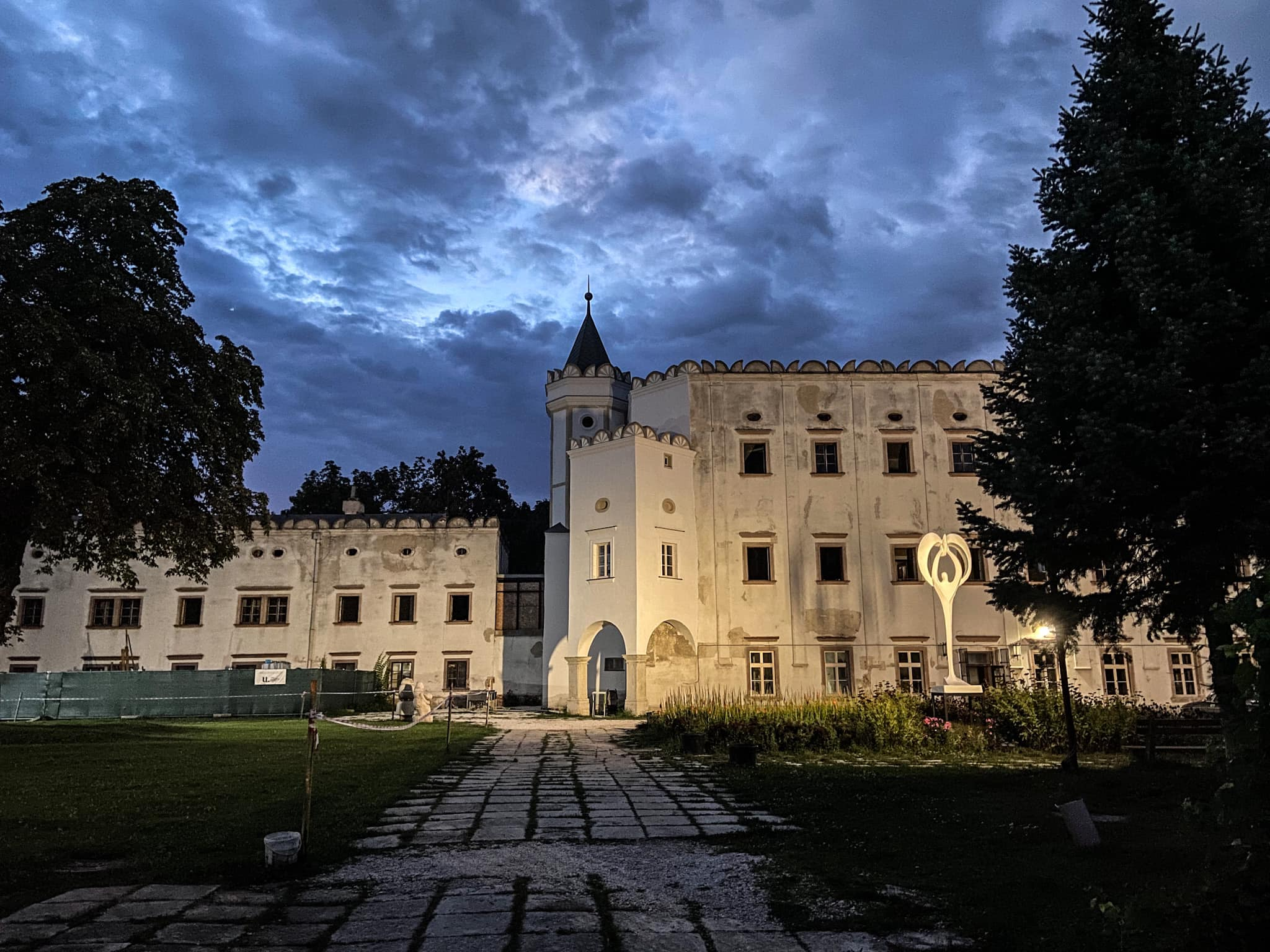 Kaštieľ v Moravanoch nad Váhom